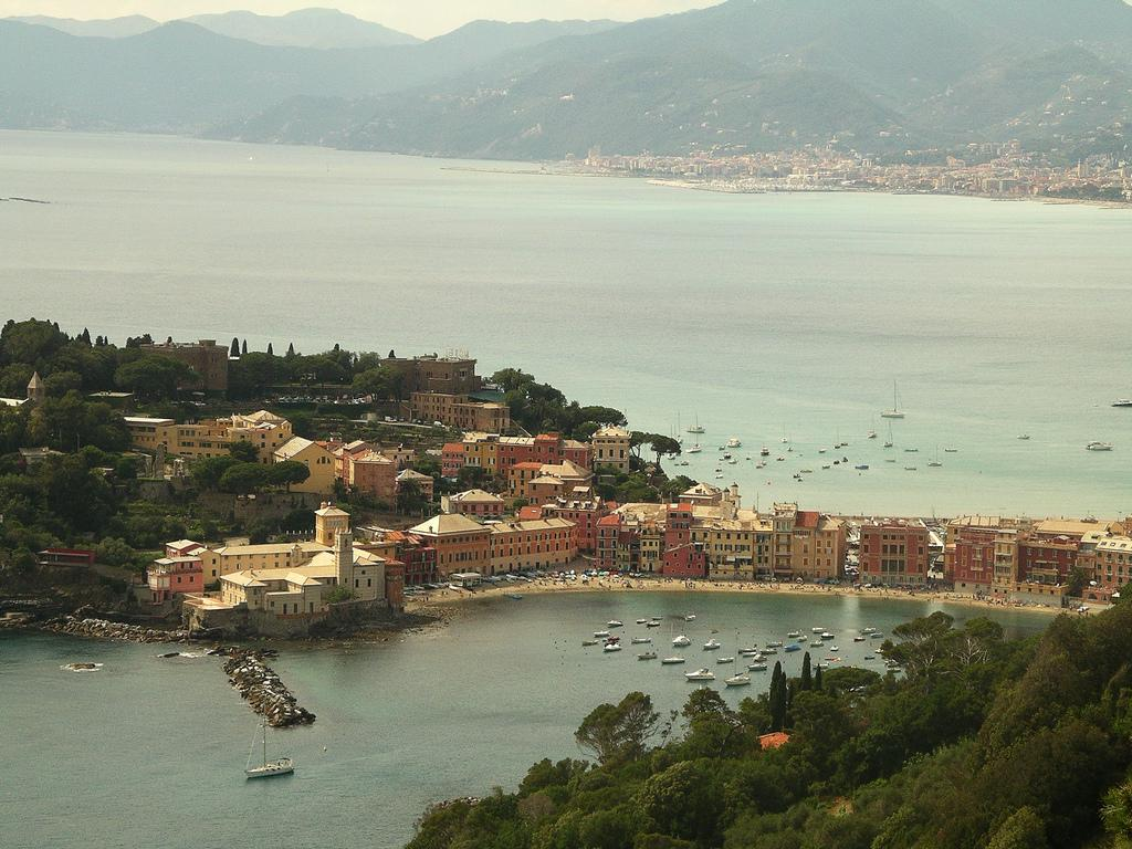 Baia del Silenzio, Sestri Levante, Liguria, Italia